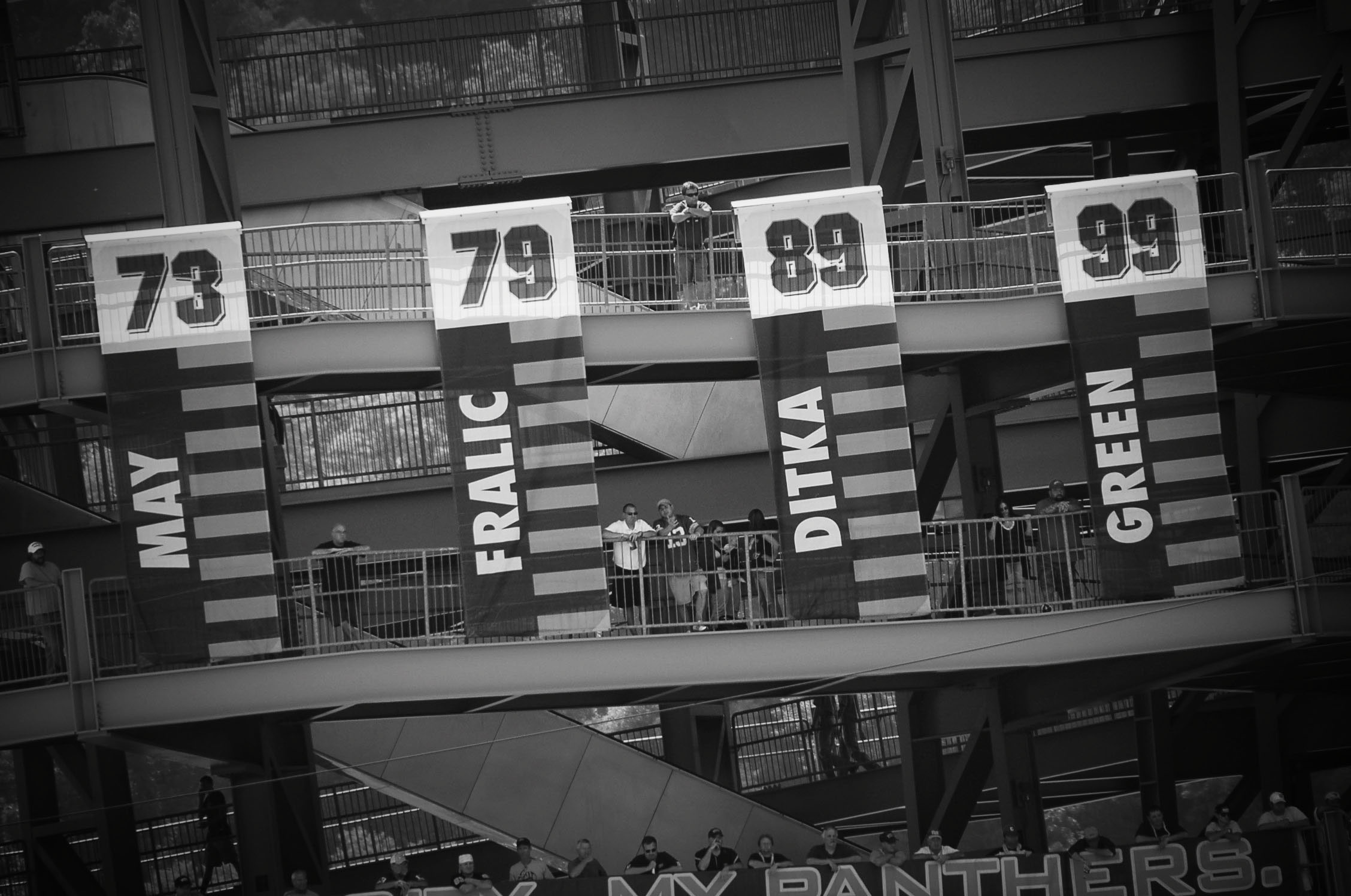 Pittsburgh 046